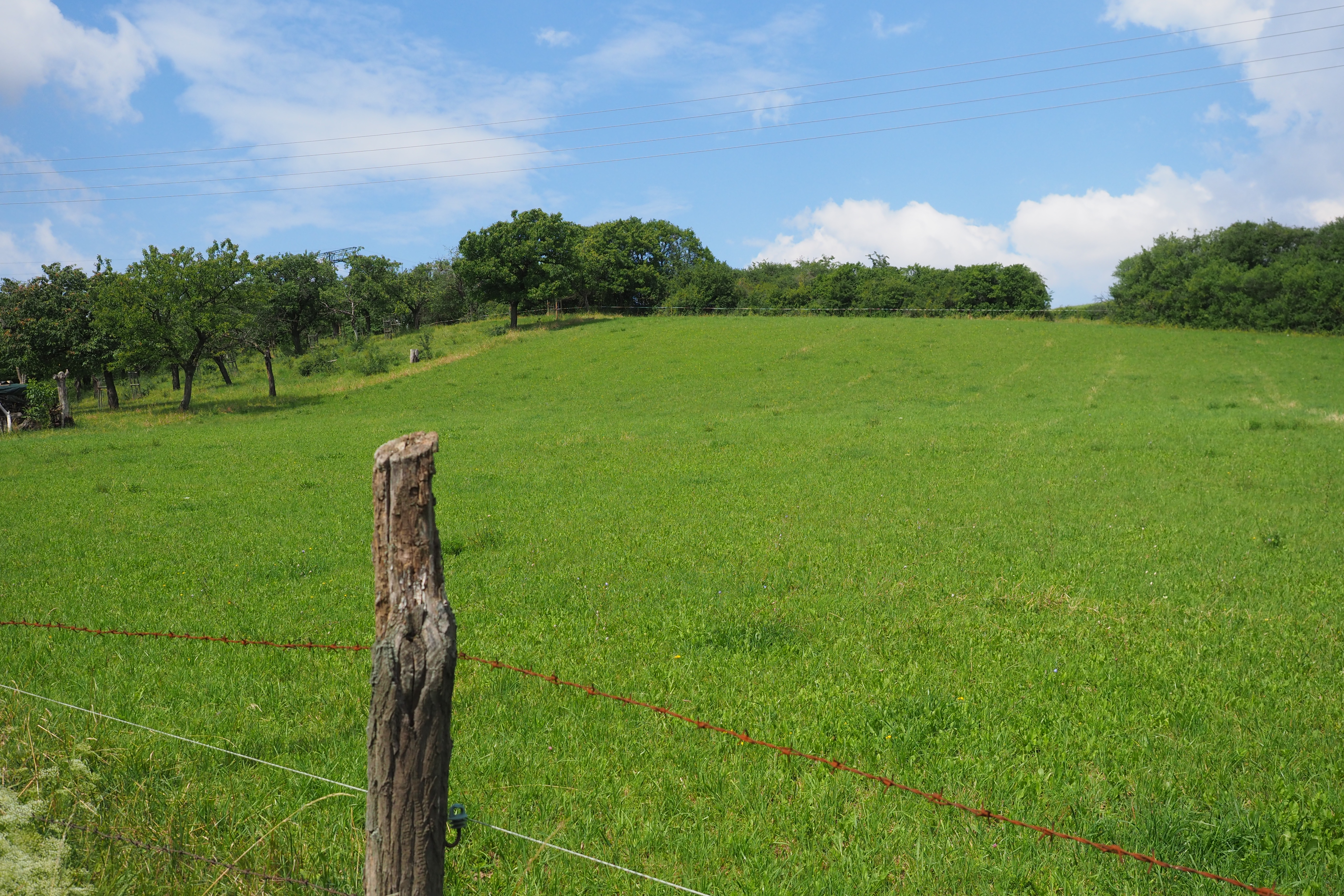 Naturschutzgebiet Ziegenbuschhänge Oberau